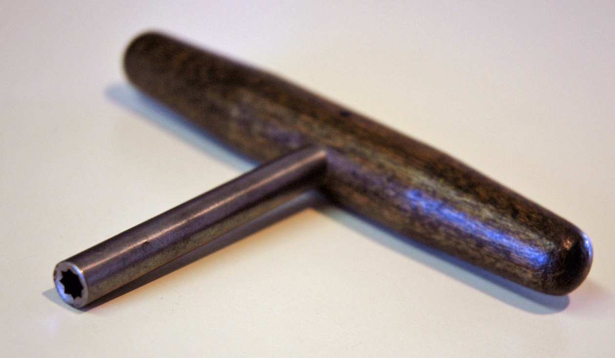 Stëmmschlëssel